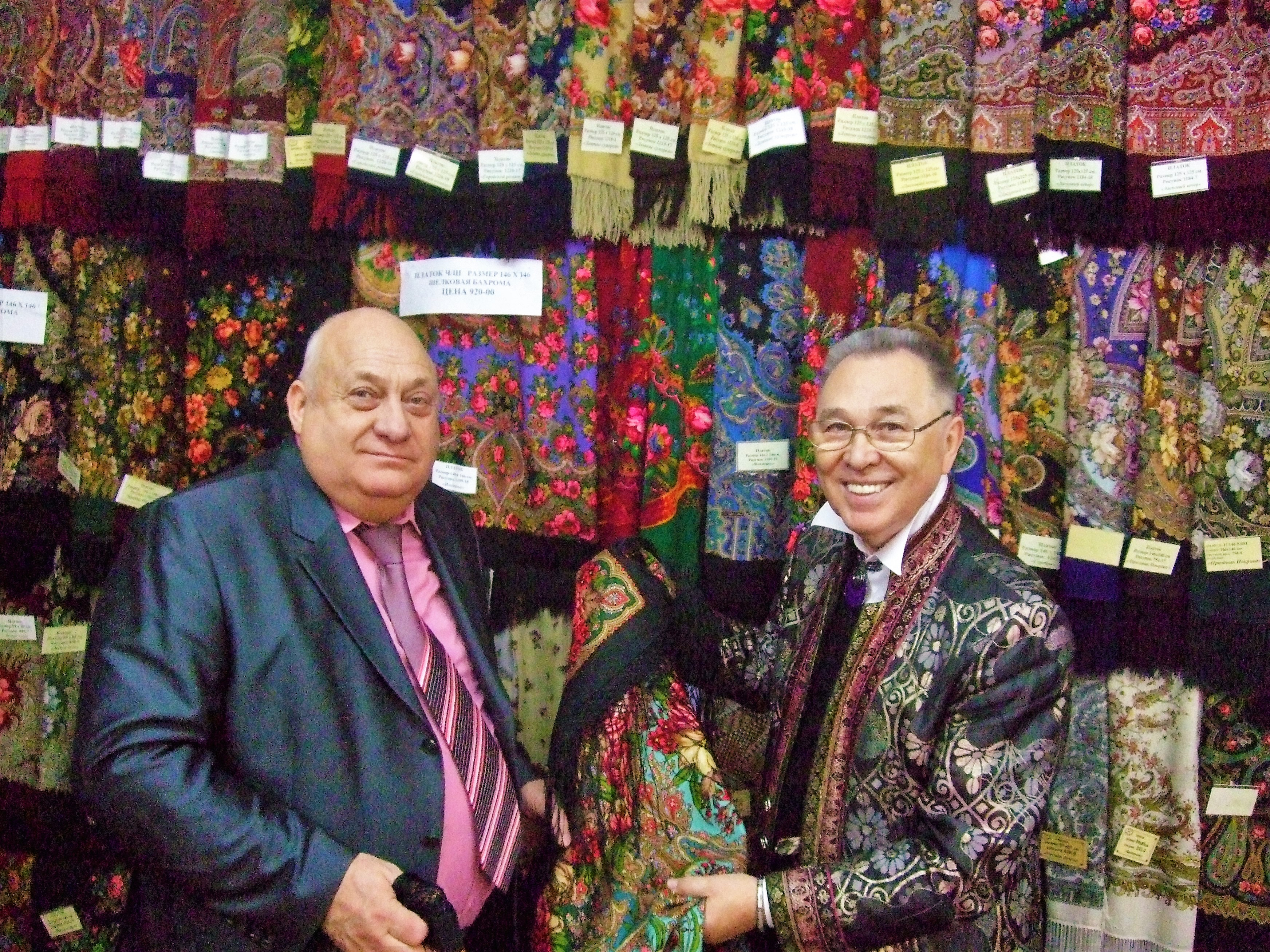 В. Стулов и модельер Слава Зайцев на ОАО "Павловопосадская платочная мануфактура", 2010 г.